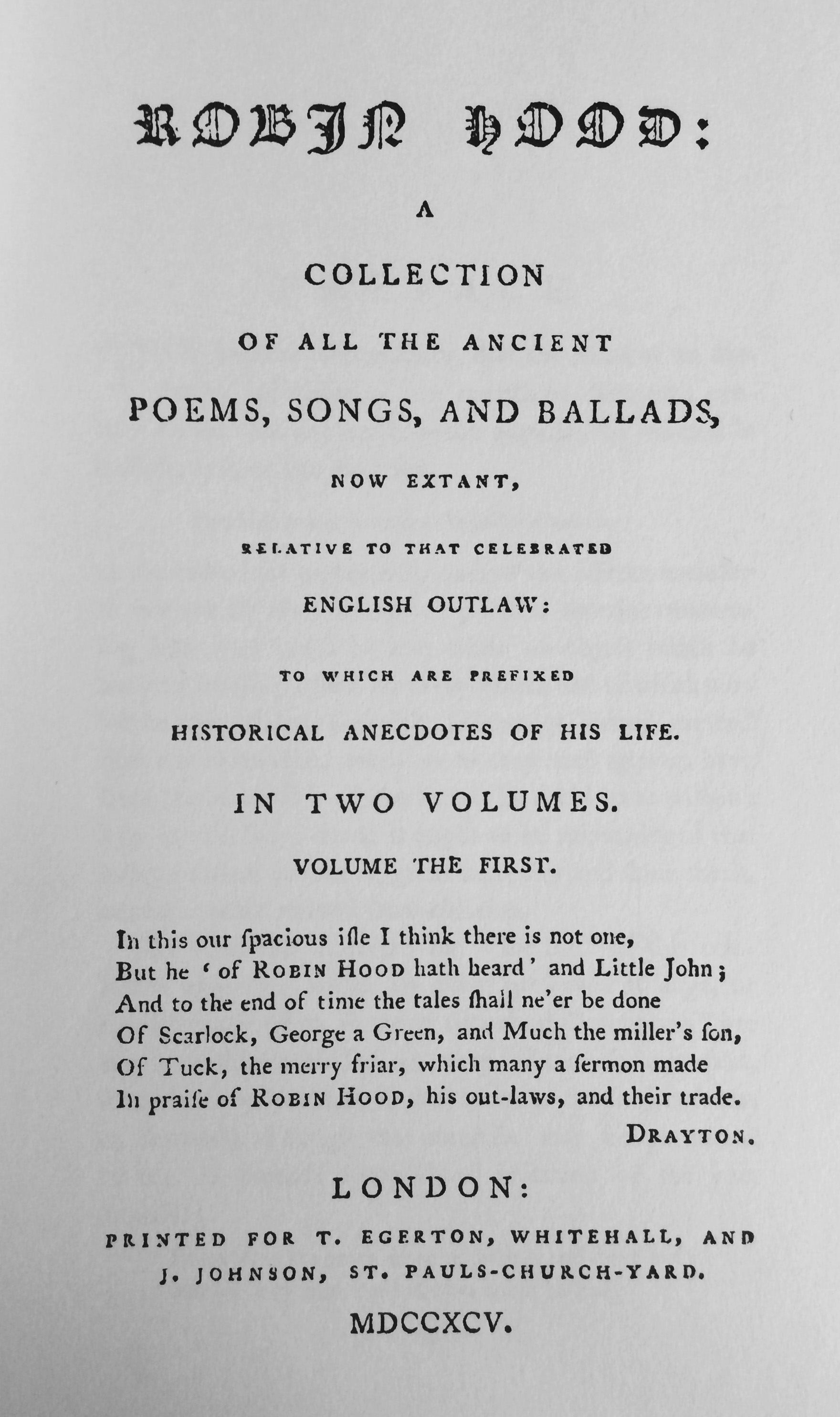 Die Titelseite von Joseph Ritsons Anthologie Robin Hood: A Collection of All the Ancient Poems, Songs, and Ballads, Now Extant, Relative to that Celebrated English Outlaw. Erstausgabe 1795 mit einem Zitat Michael Draytons